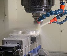 En la imagen se puede ver el fresado de una fina pared de aluminio con un fluido cortando llamado taladrina